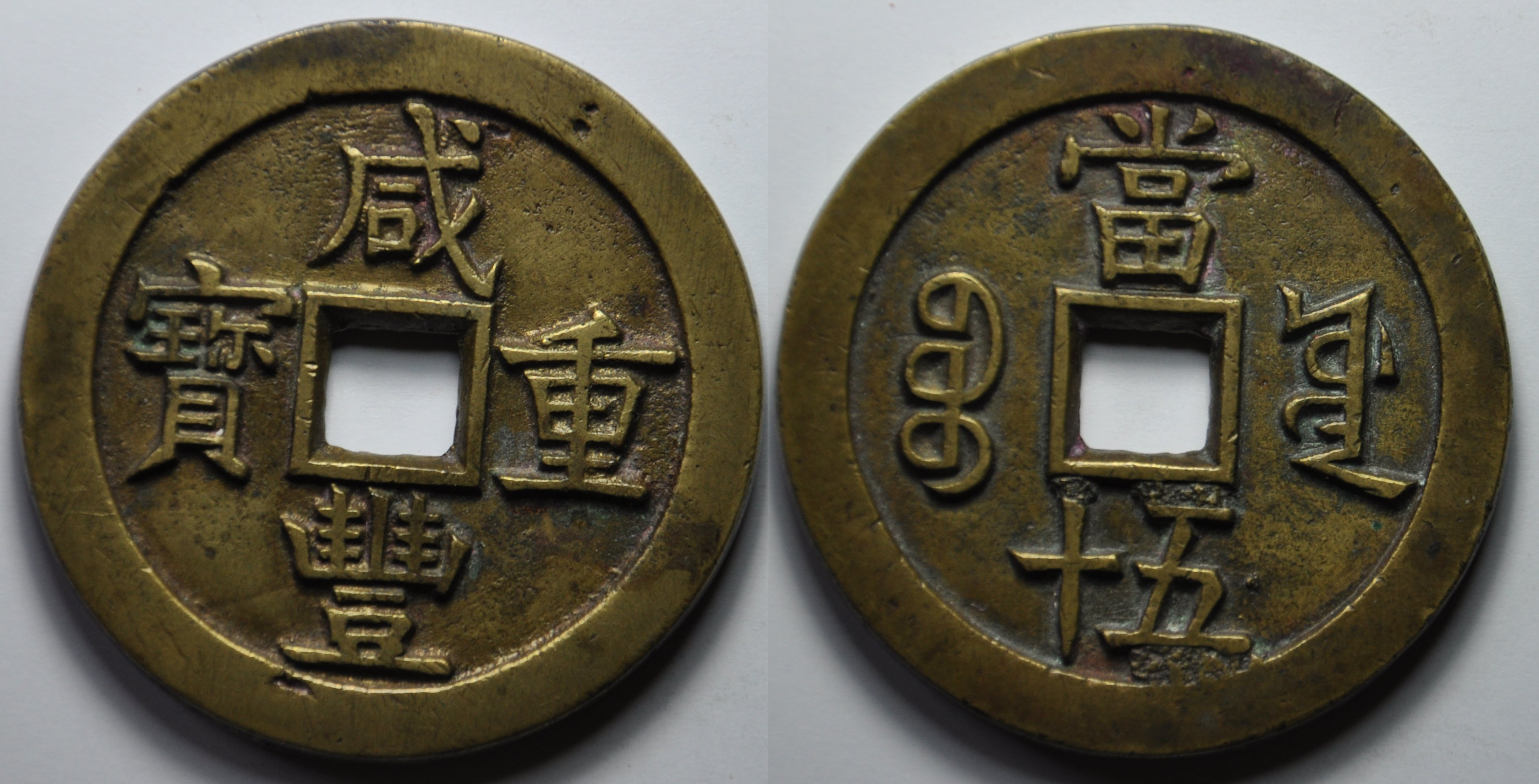 Une monnaie de 50 cash de l'empereur Wen Zong (1851-61), dynastie Qing (1644-1912) de l'atelier du ministère des travaux publics à Pékin (Vieille branche) A/ Xian Feng zhong bao (Monnaie lourde de Xian Feng) R/ Bao yuan, Dang wushi (valeur 50) Laiton Poids 61.7 g. Diamètre 55.6 mm Référence H22.759; MNIS 3899; émise entre novembre 1853 et mars 1854.